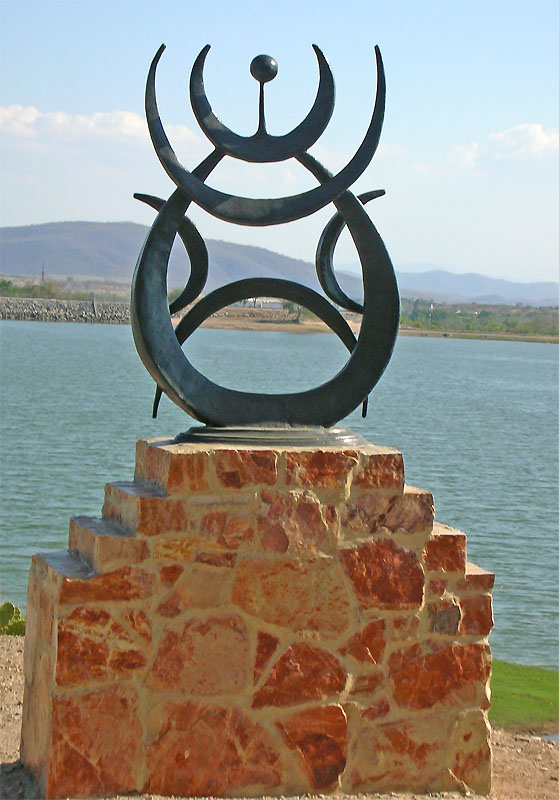 Un Sueño. Escultura en Iguala. Obra de Miguel Michel